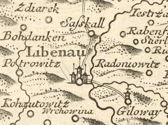 Detail městečka Hodkovice nad Mohelkou, Libenau, paří do kategorie "Opida, seu, vici / Markflecken".